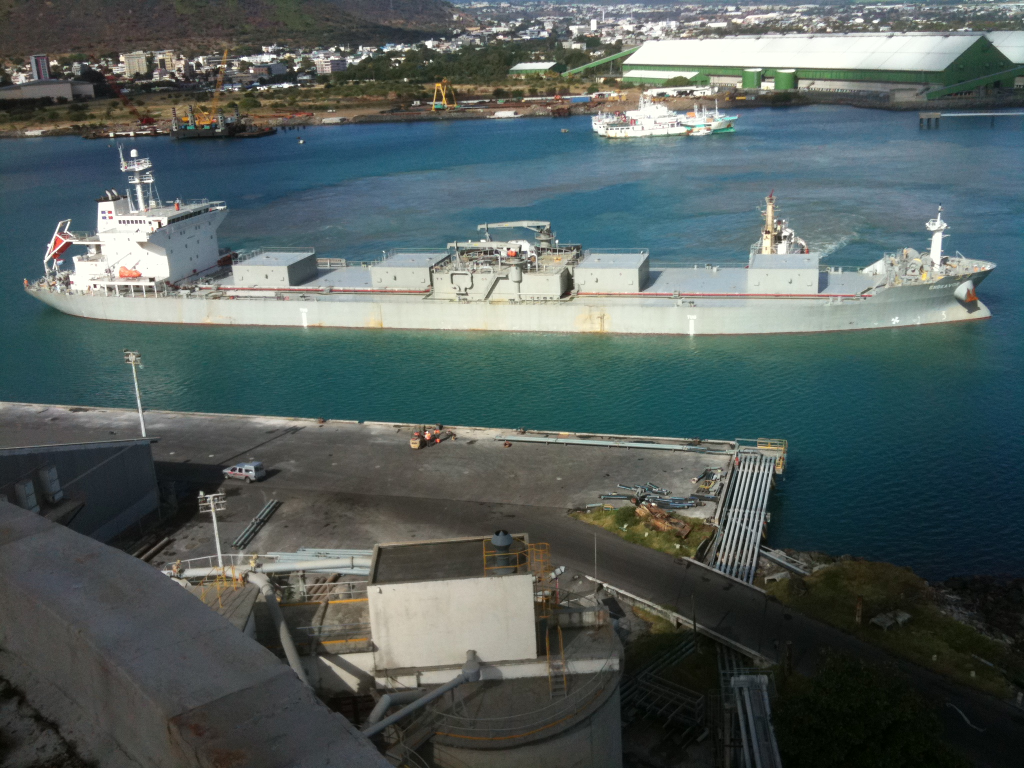 Судно-цементовоз "Endeavor" в Порт-Луи, Маврикий Type of ship : Cement Carrier IMO number : 9499723 Callsign : LXZE MMSI Number: 253077000 GRT: 18176 DWT: 28300 Year of built: 2009